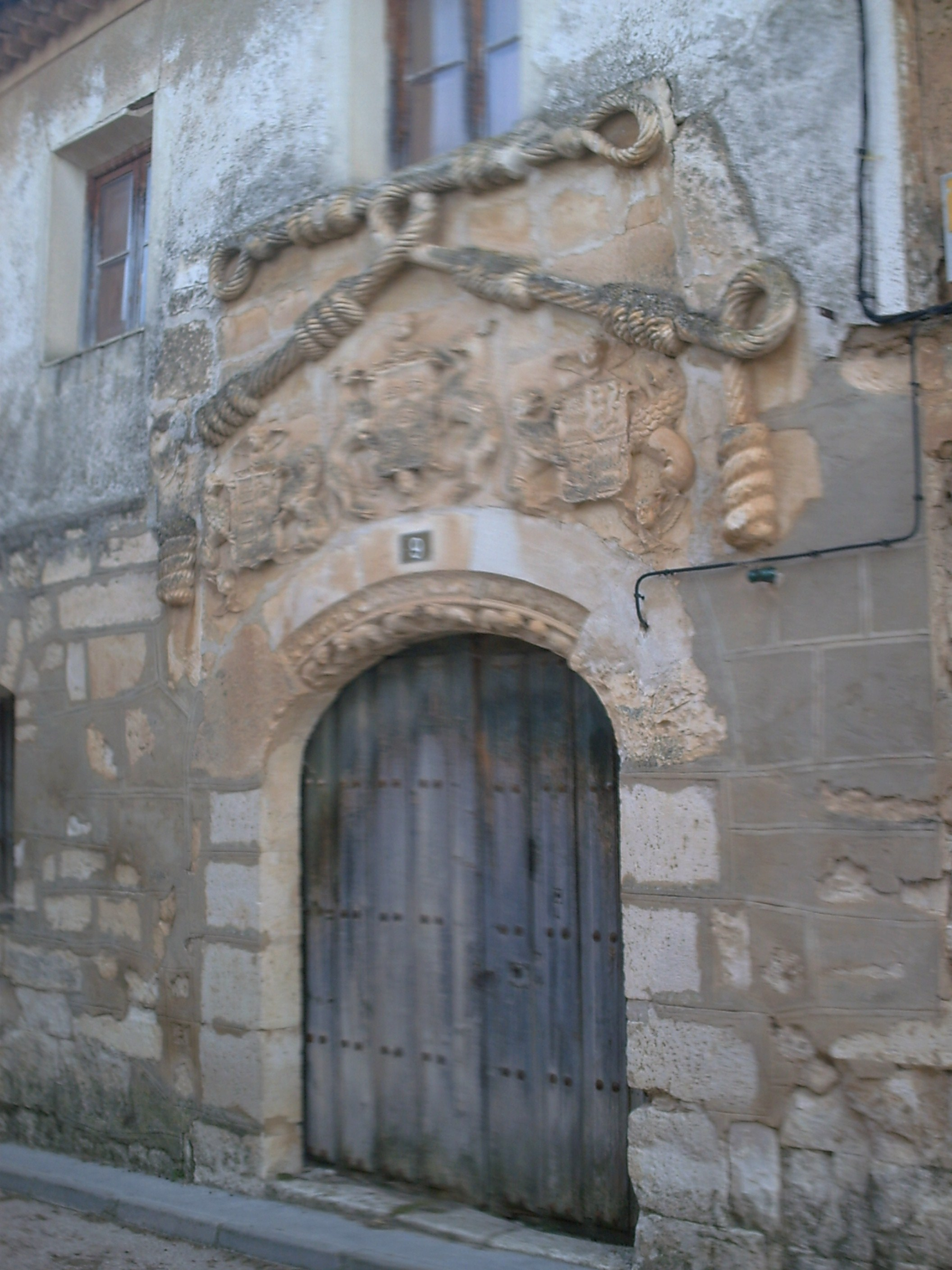 Casa del Cordón. Detalle de la fachada